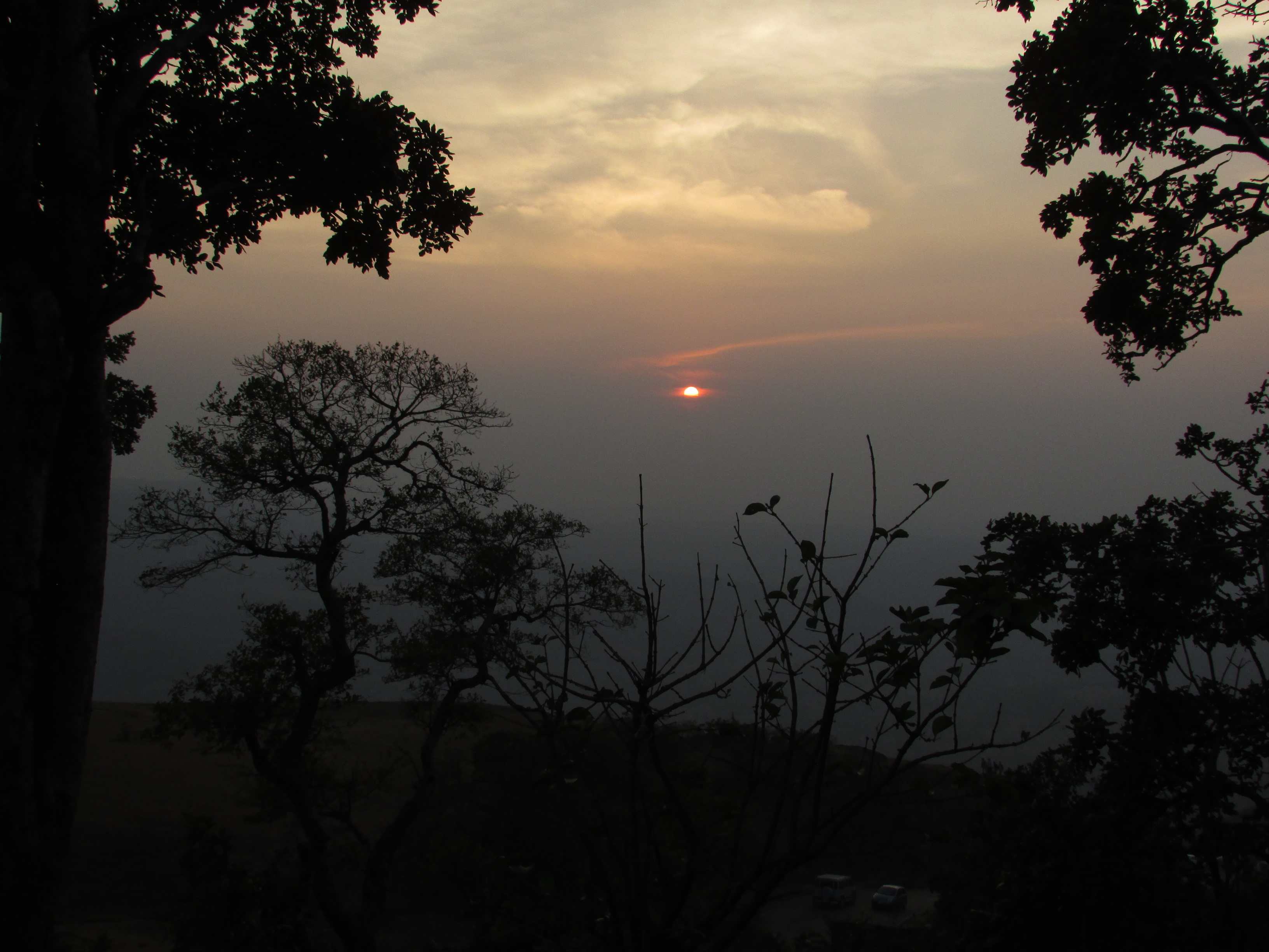 Sunset